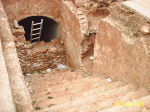 Foto del refugio antiaéreo durante la Guerra Civil española de San Clemente